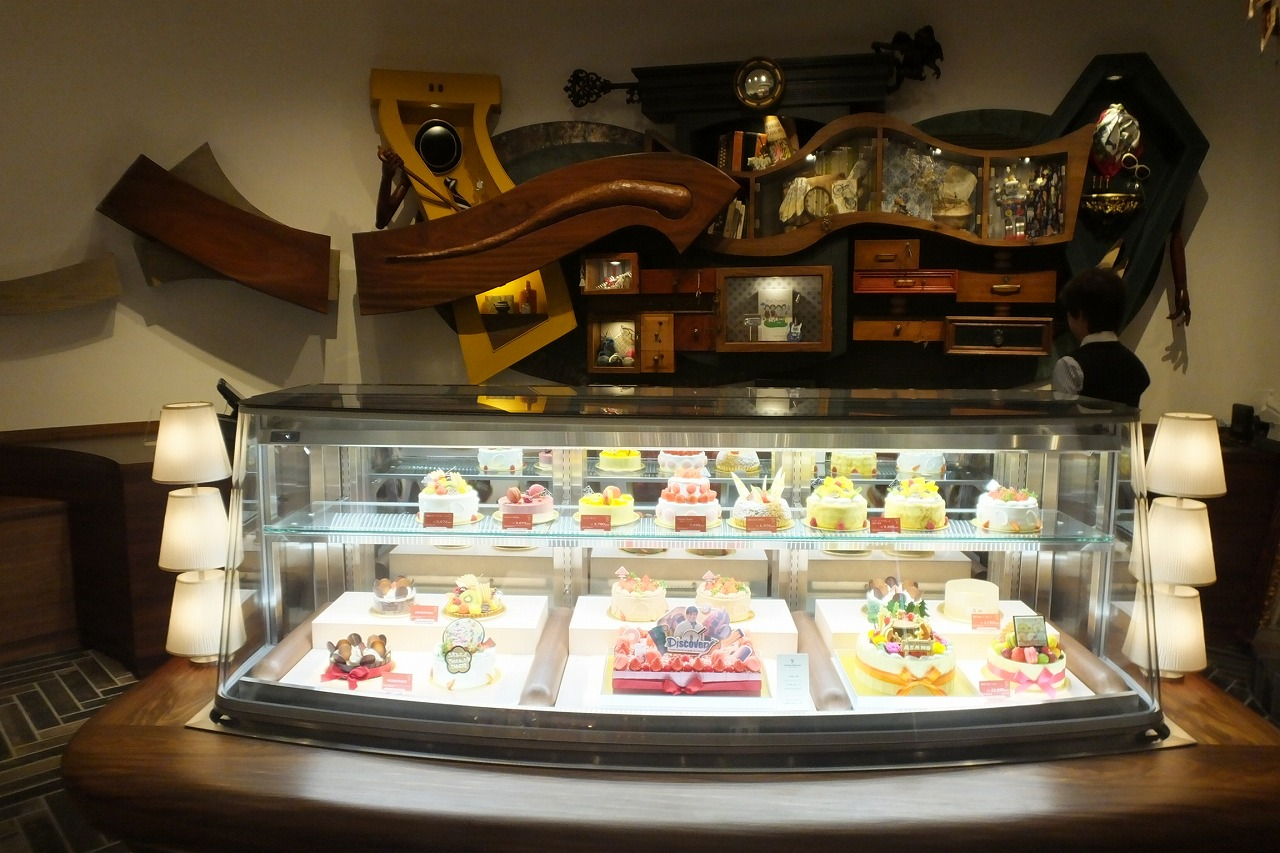 PATISSIER eS koyama - 夢先案内会社 FANTASY DIRECTOR（ファンタジー・ディレクター） パティシエ エス コヤマ 小山進